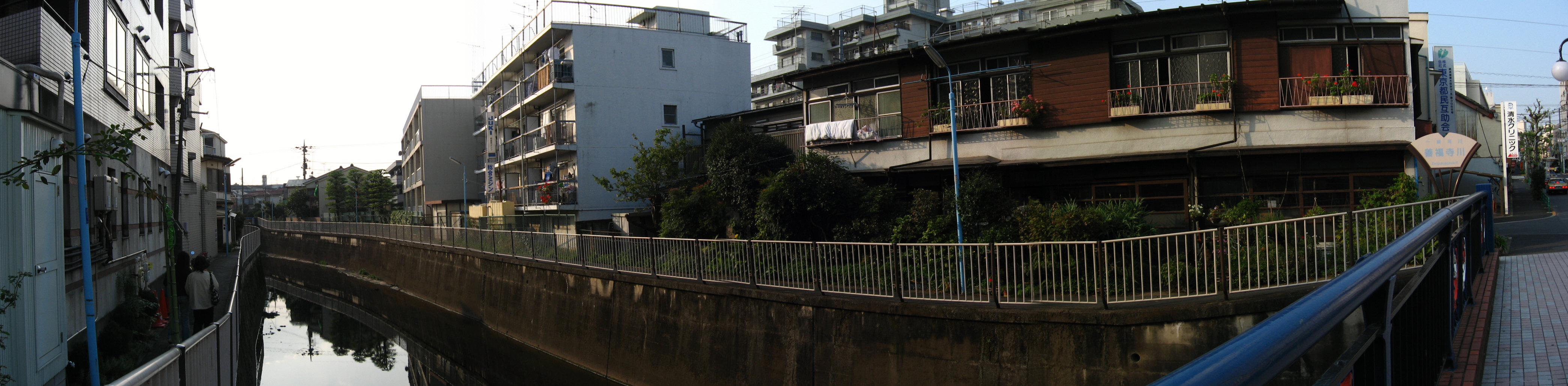 Zenpukuji River.